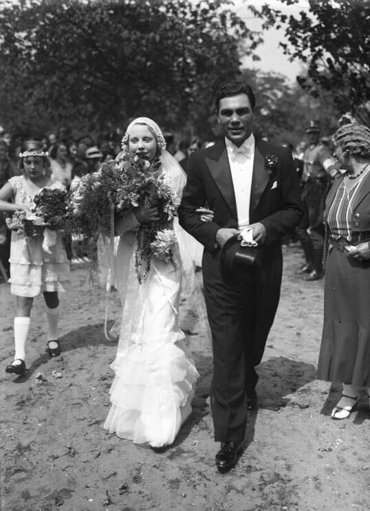 Die kirchliche Trauung des deutschen Ex-Boxweltmeisters Max Schmeling mit der Filmschauspielerin Anny Ondra in Bad Saarow! Das glückliche Brautpaar Ex-Boxweltmeister Max Schmeling und Filmschauspielerin Anny Ondra, verlassen mit Blumen überladen, die Kirche in Bad Saarow nach Trauung.